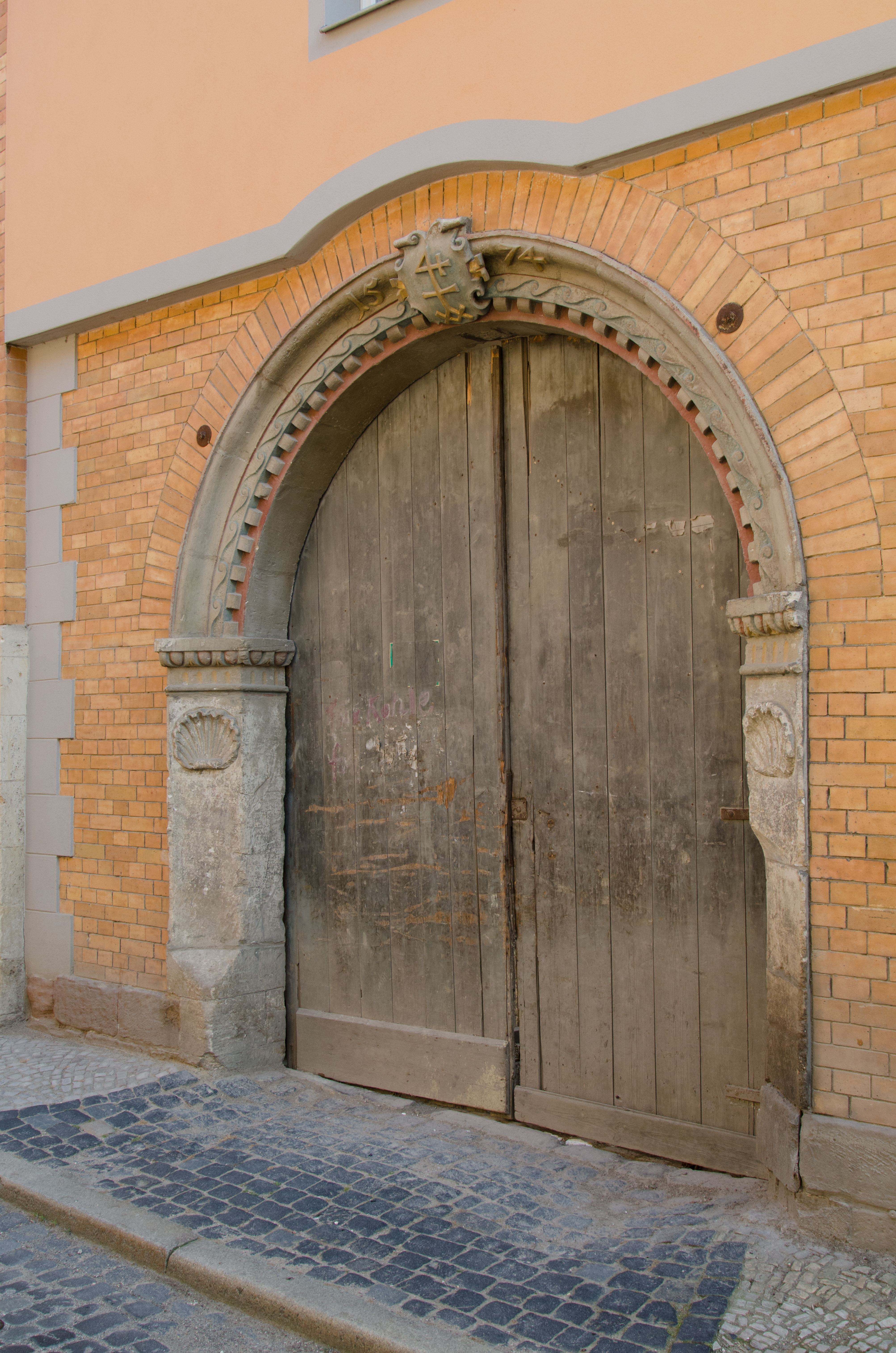 Naumburg, Seilergasse 18, 19